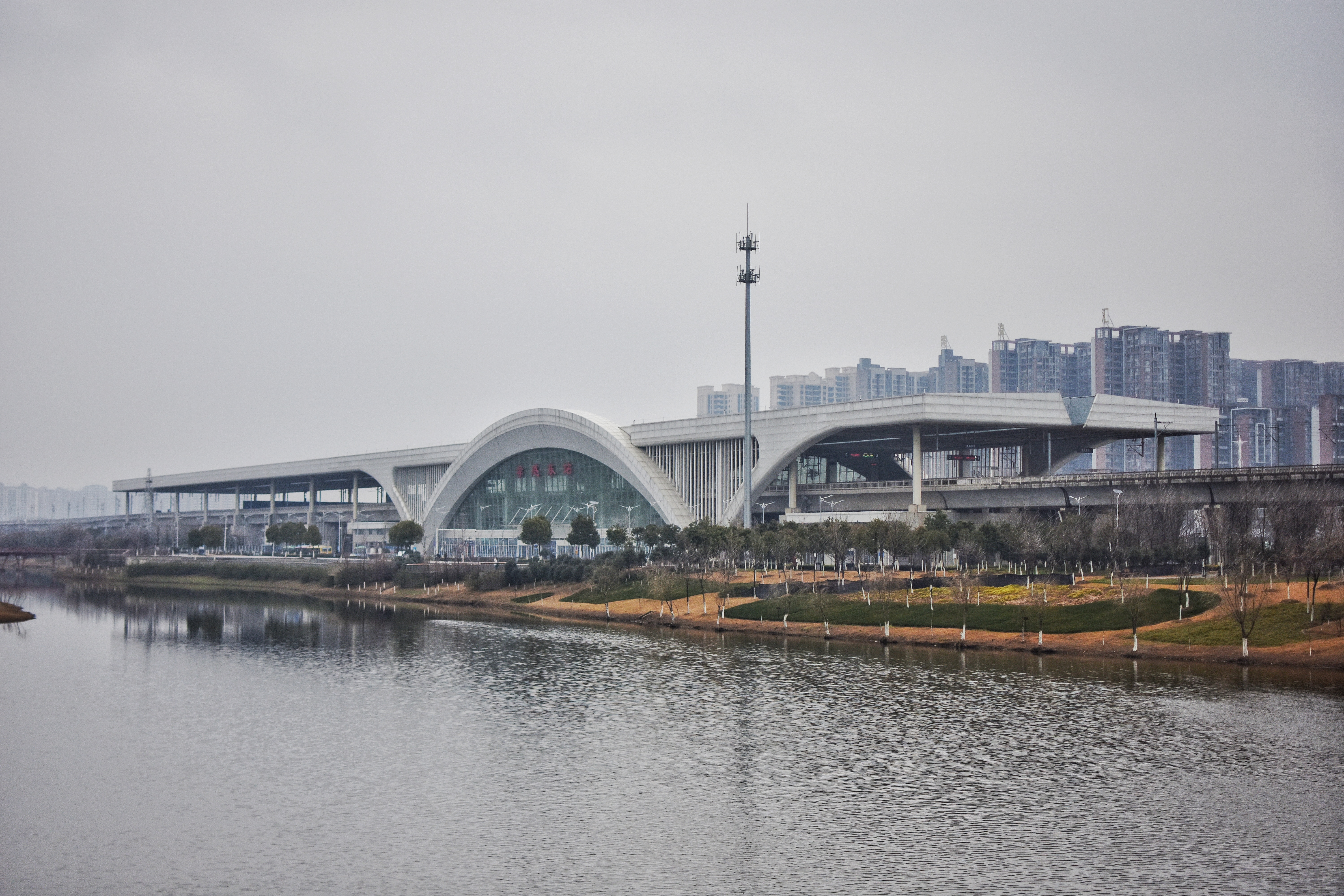 中文（中国大陆）: 孝感东站整体外观